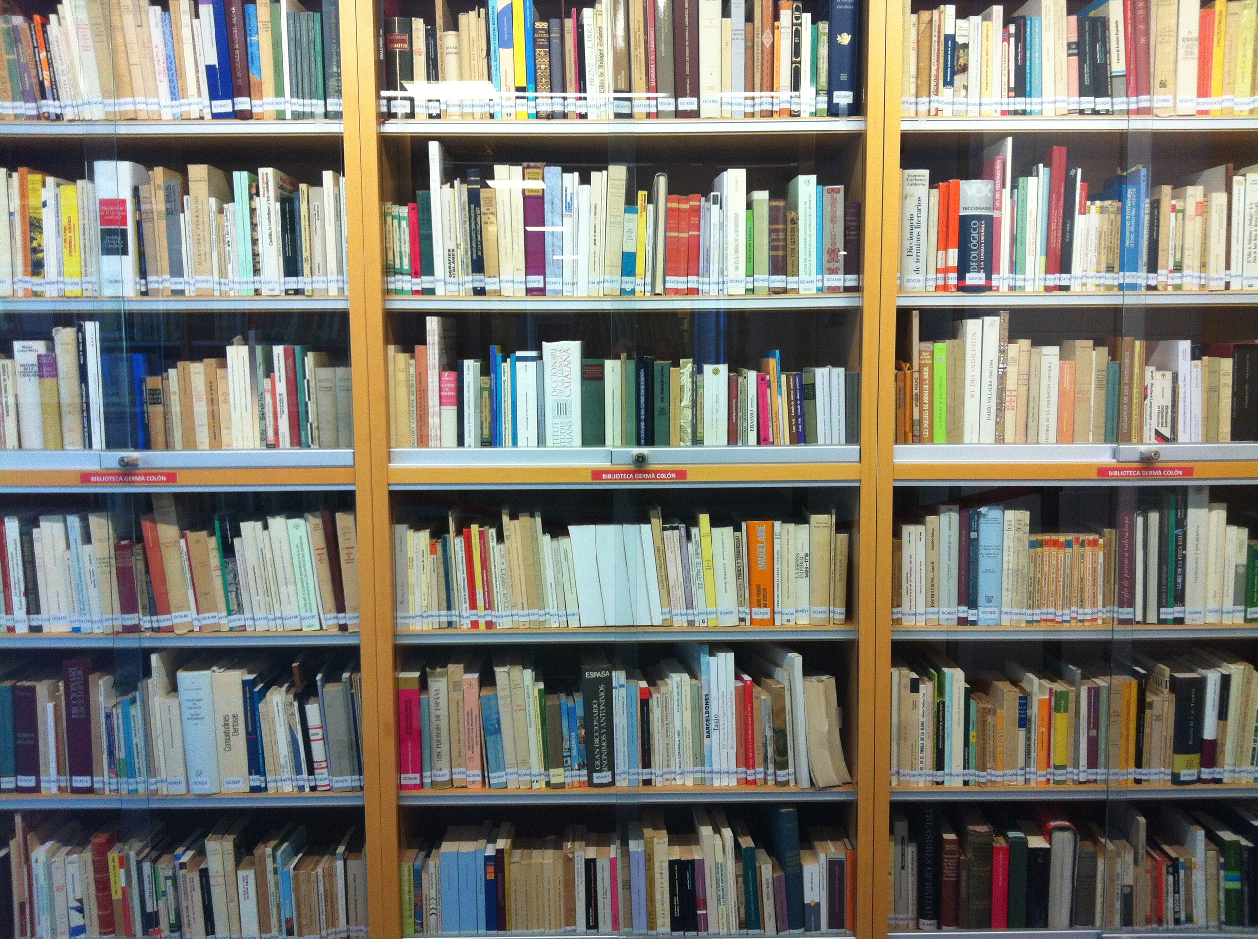 Biblioteca Germà Colon setembre